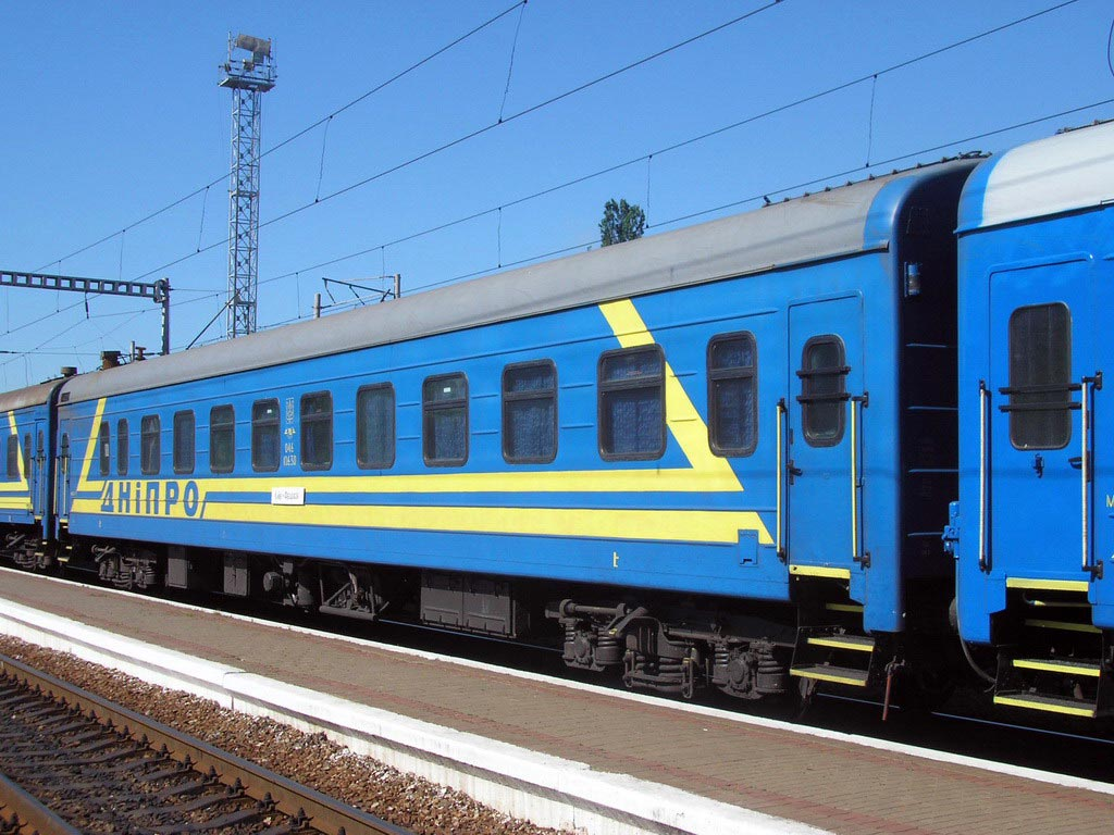 Вагон поезда «Дніпро»